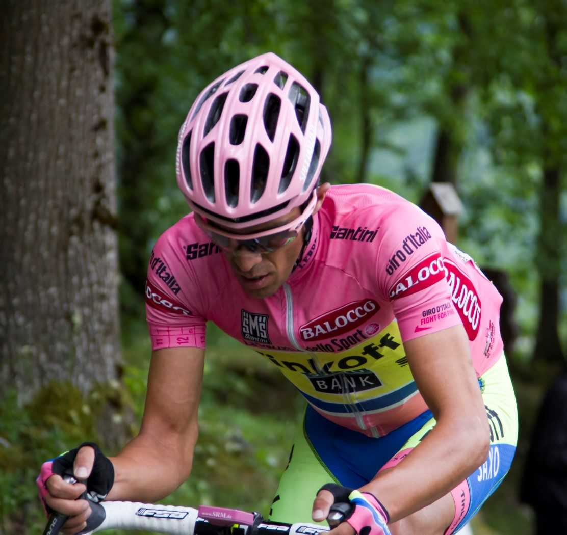 099 contador